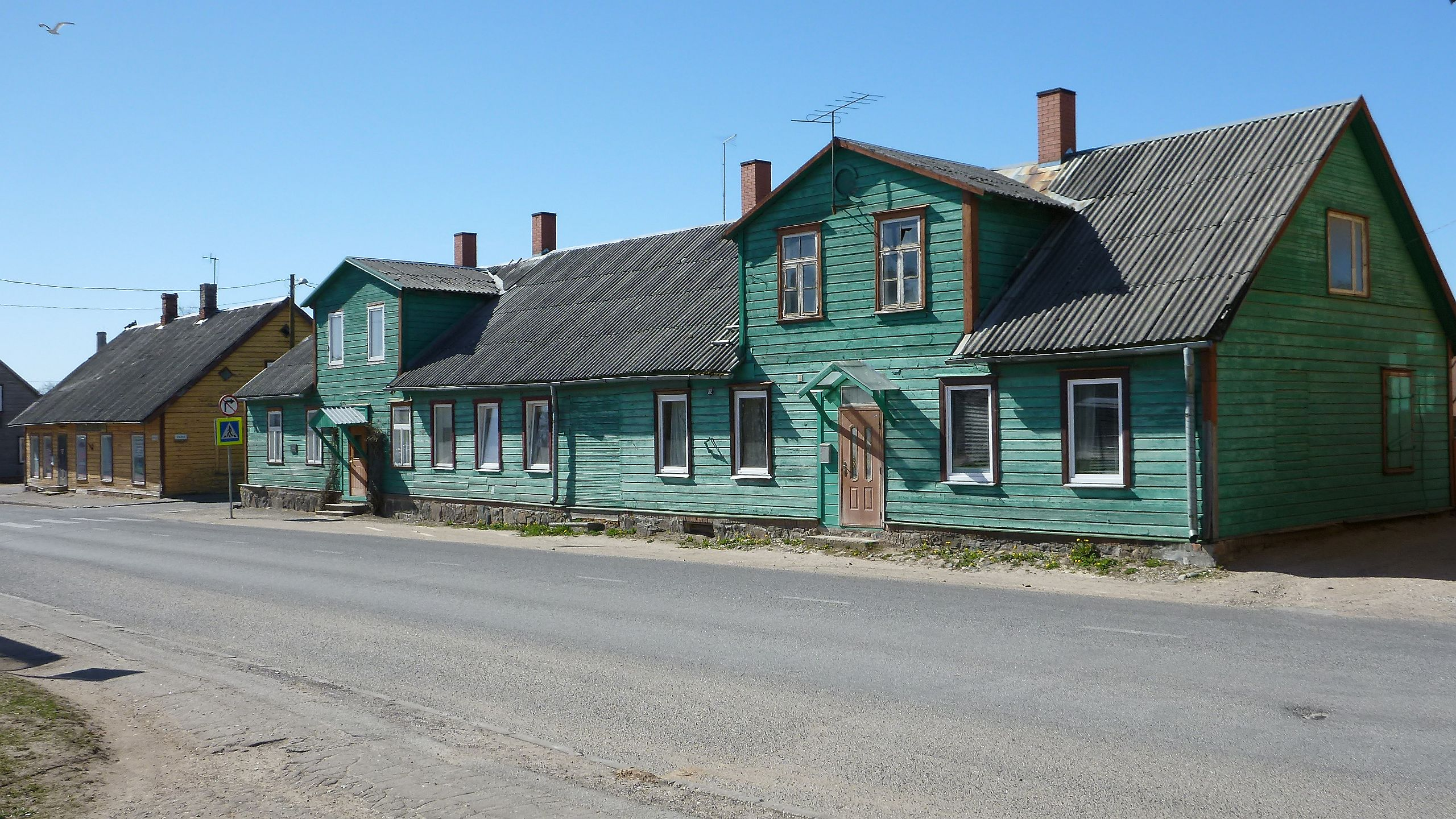 Taloja Vaksali-kadulla Viljandissa